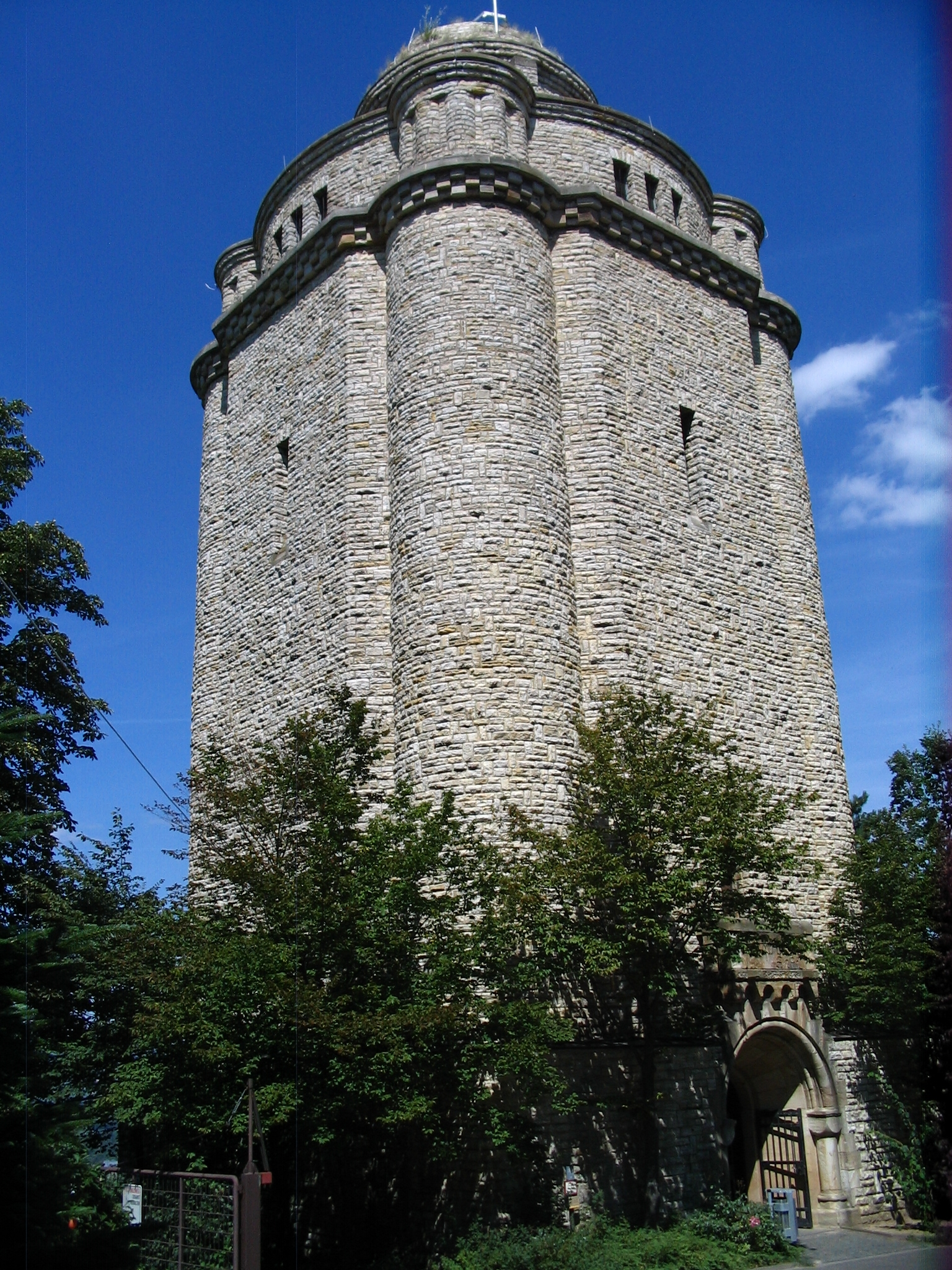 Der Bismarckturm von Ingelheim am Rhein.